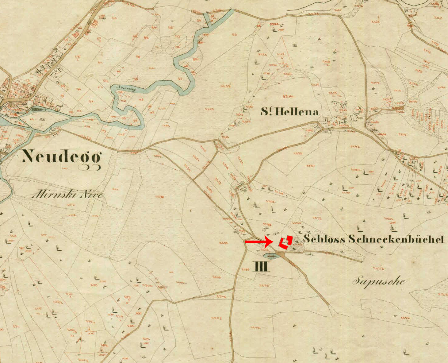 Reambulančni kataster za Kranjsko, 1867-1882